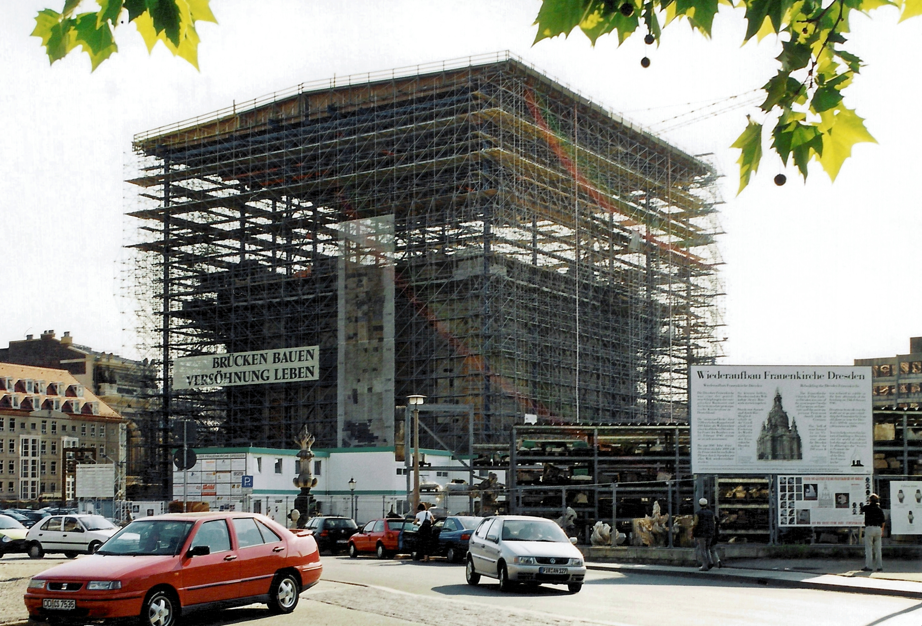 Frauenkirche Dresden im Jahr 2000